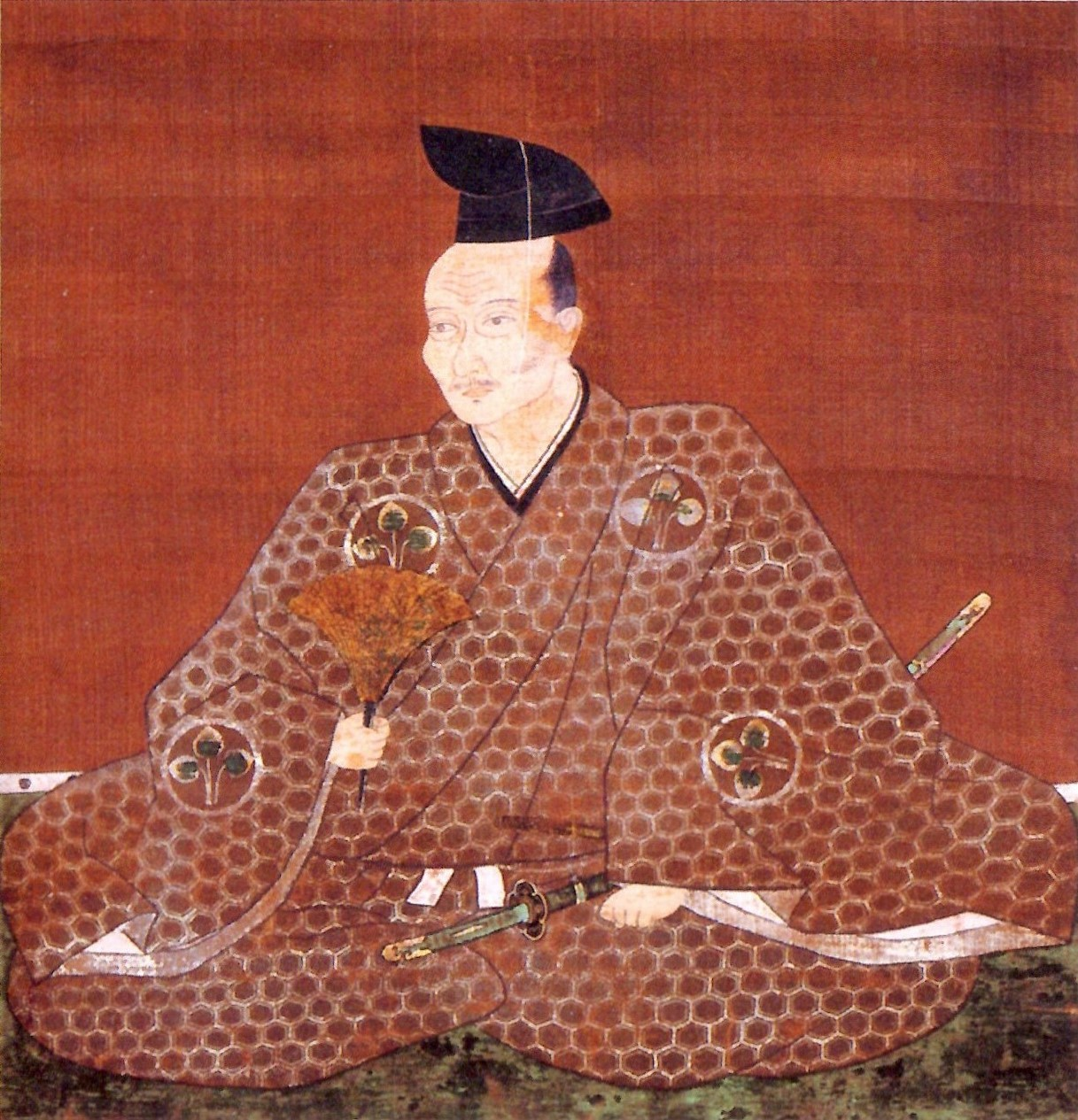 本多康重の肖像。